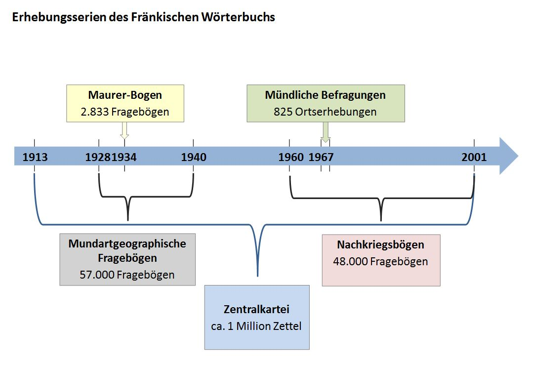 Erhebungsserien des WBF (Grafik A.König)